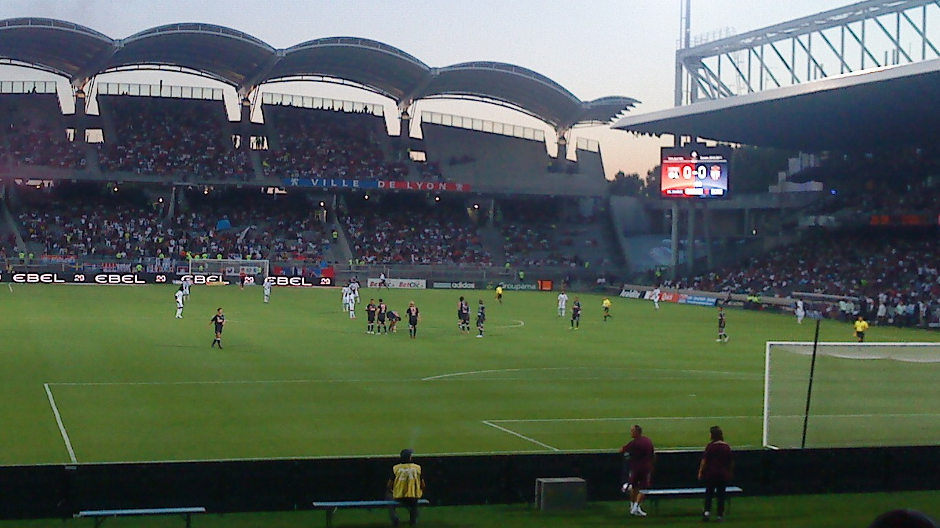 Match opposant l'Olympique lyonnais à l'AS Monaco lors de la première journée du championnat de France de Ligue 1 2010-2011